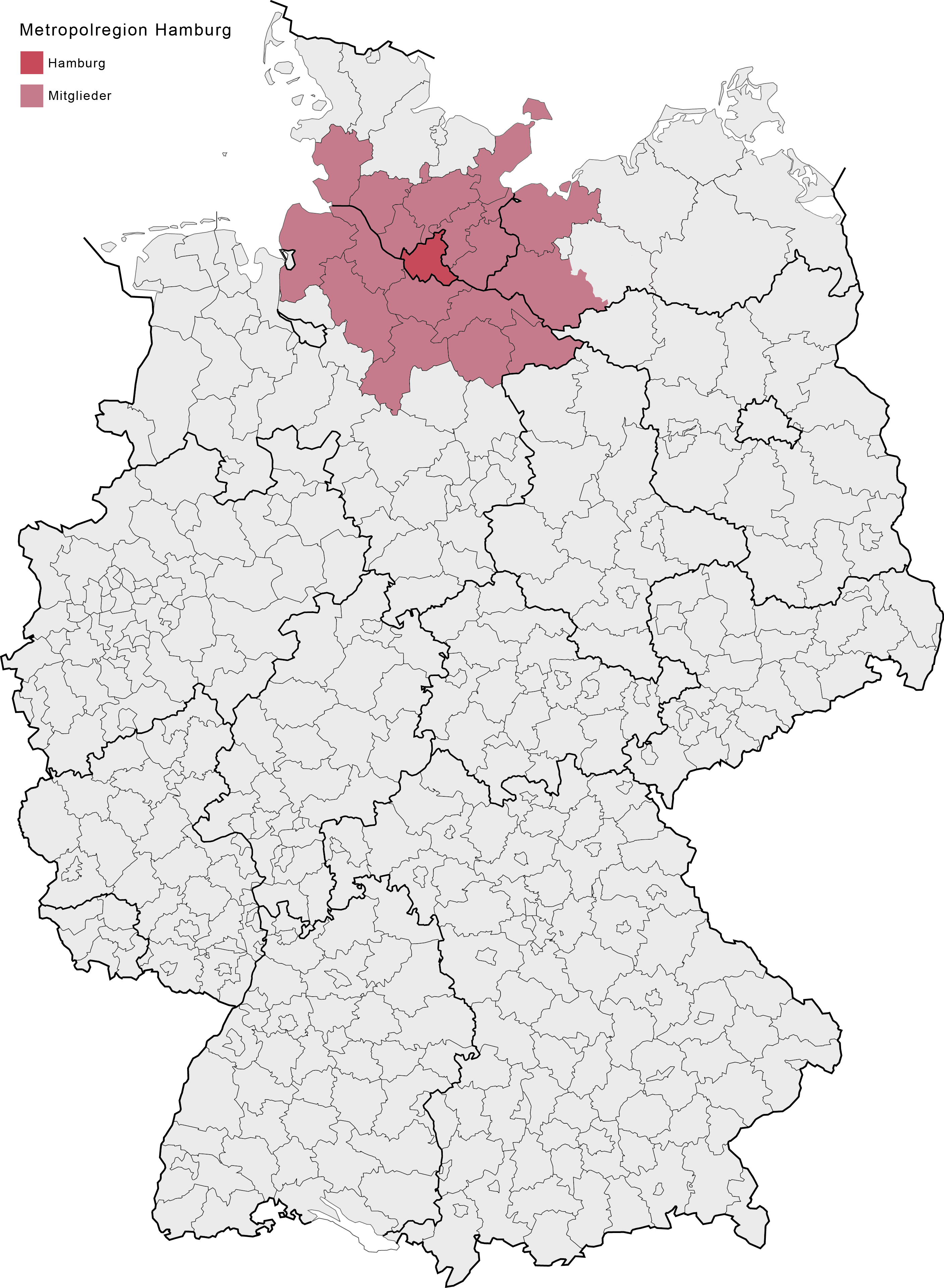 Aktualisierung der vorherigen Karte file:Metropolregion Hamburg 2007-08.png (Author ursprünglich Torsten Bätge) auf den Stand seit Mai 2012 (Anmerkung s. u.)